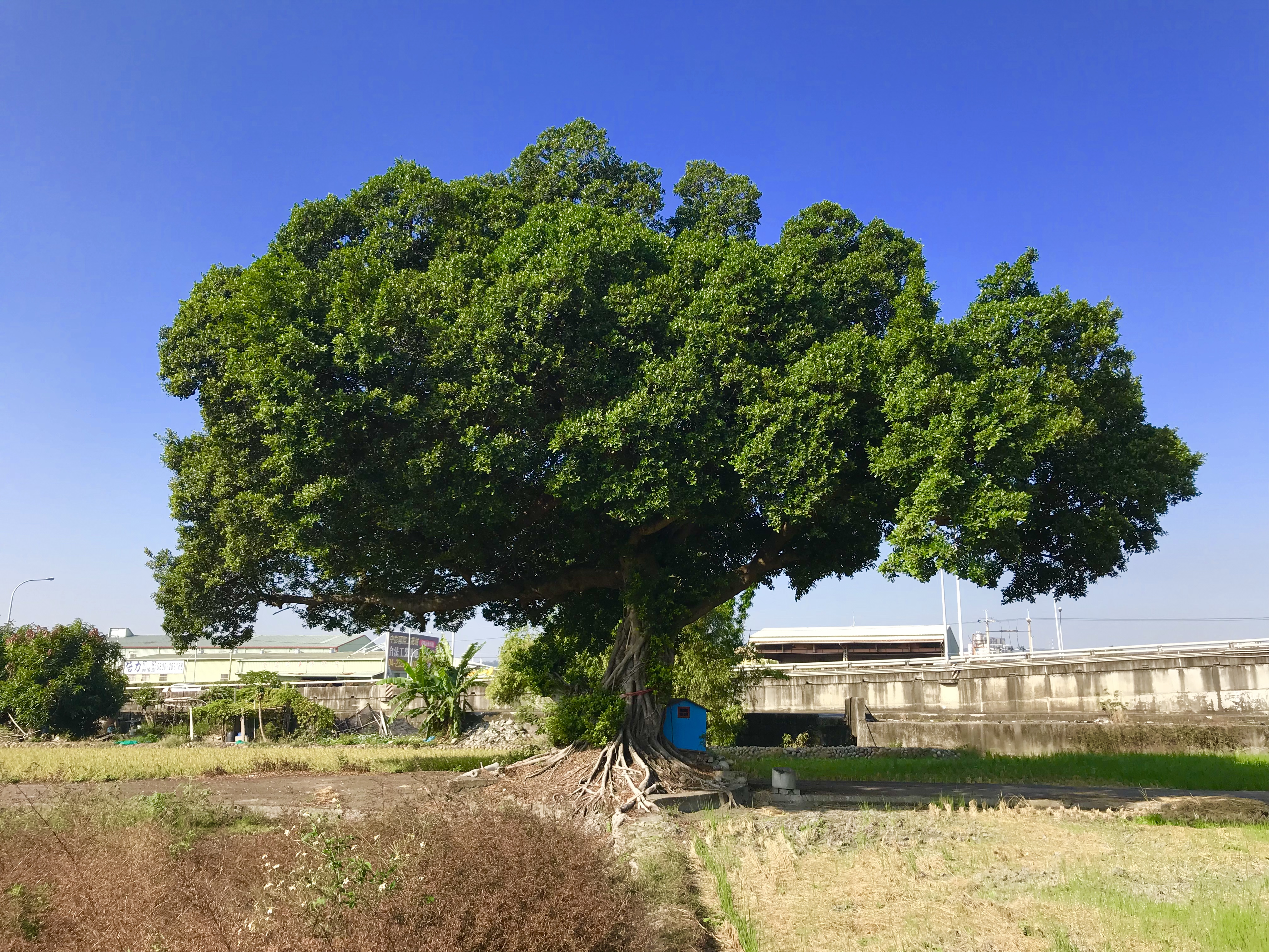 青榕公一景